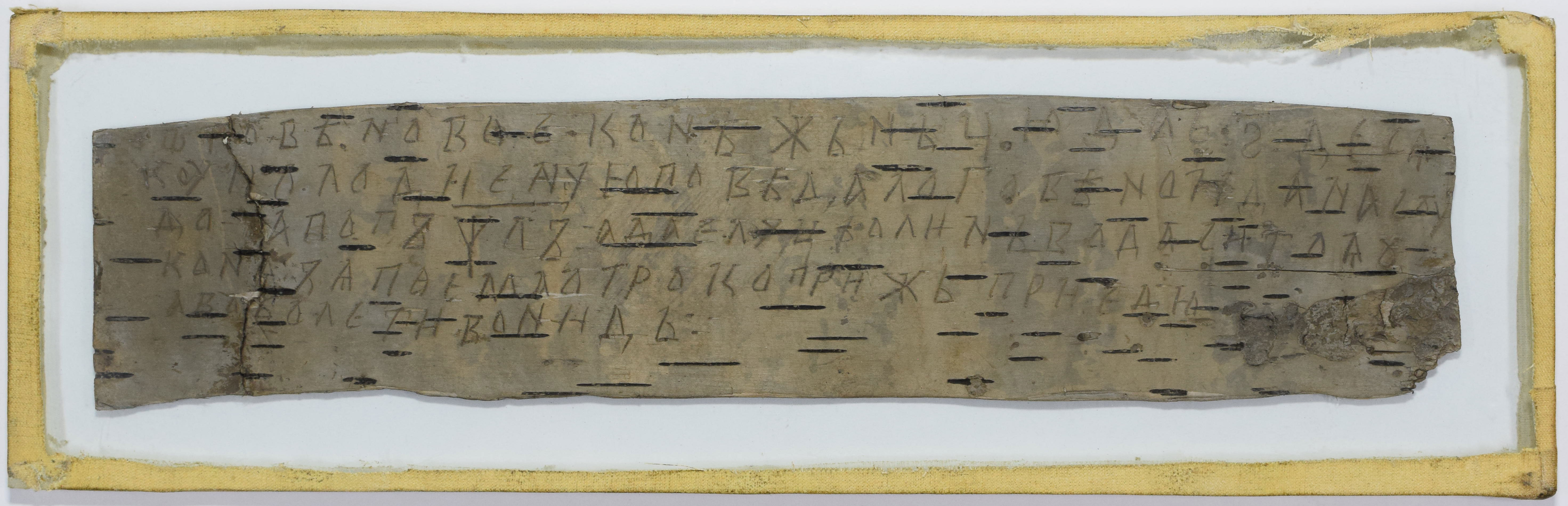 Лист Говенової до Нежнича з вимогою повернути гроші в сумі 60 кун, залишені йому на зберігання її покійним чоловіком, Говеном. Близько 1110-1124 рр. ЦДІАЛ України, ф. 131, оп. 1, спр. 891. Береста.